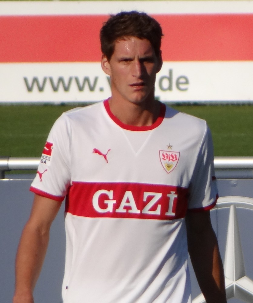 Benedikt Röcker, Verteidiger vom VfB II. Aufgenommen von